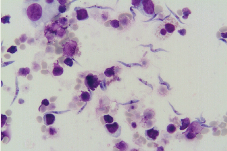 Trypanosoma melophagium v krevním řečišti